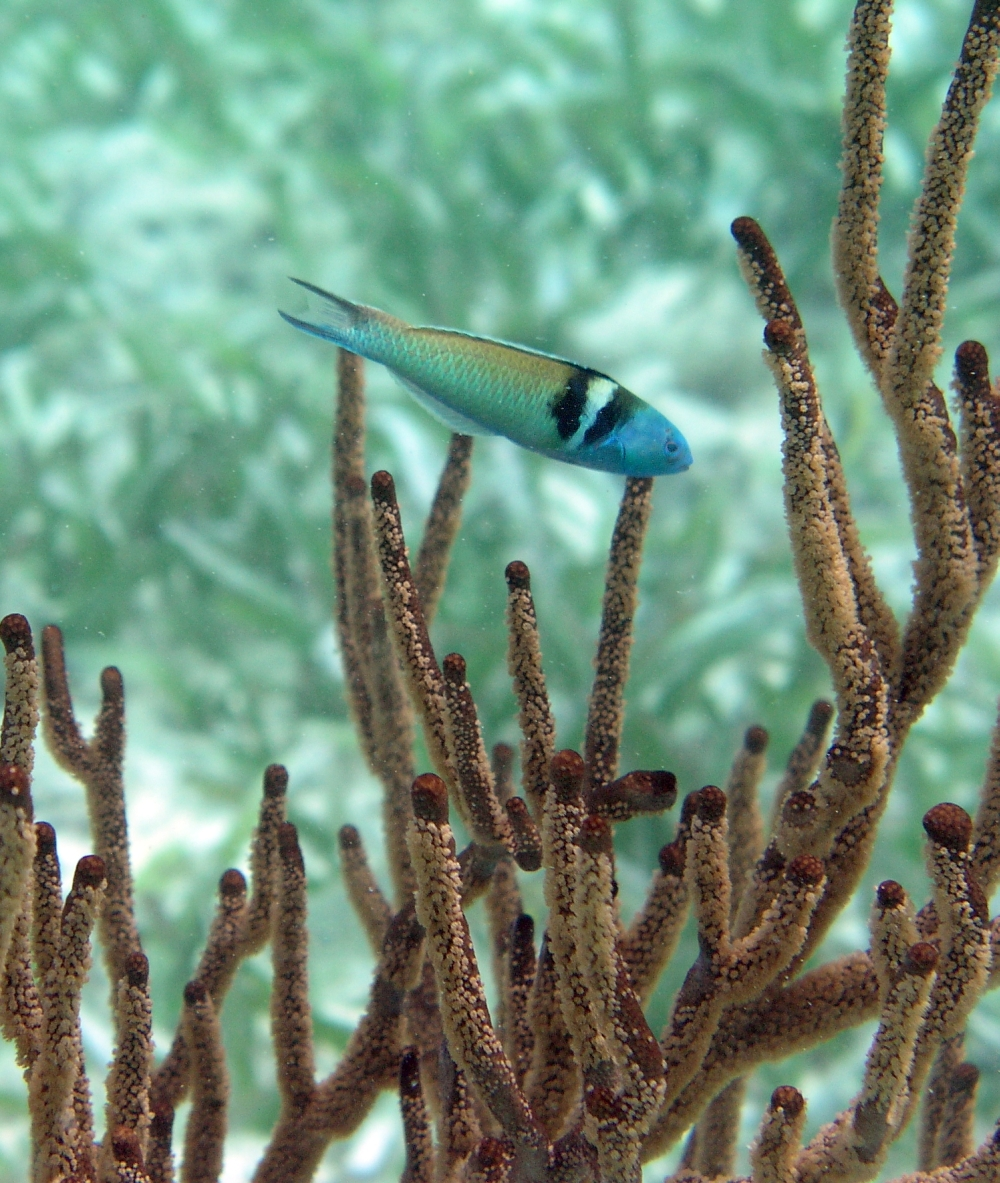 Bluehead Wrasse, Belize Barrier Reef